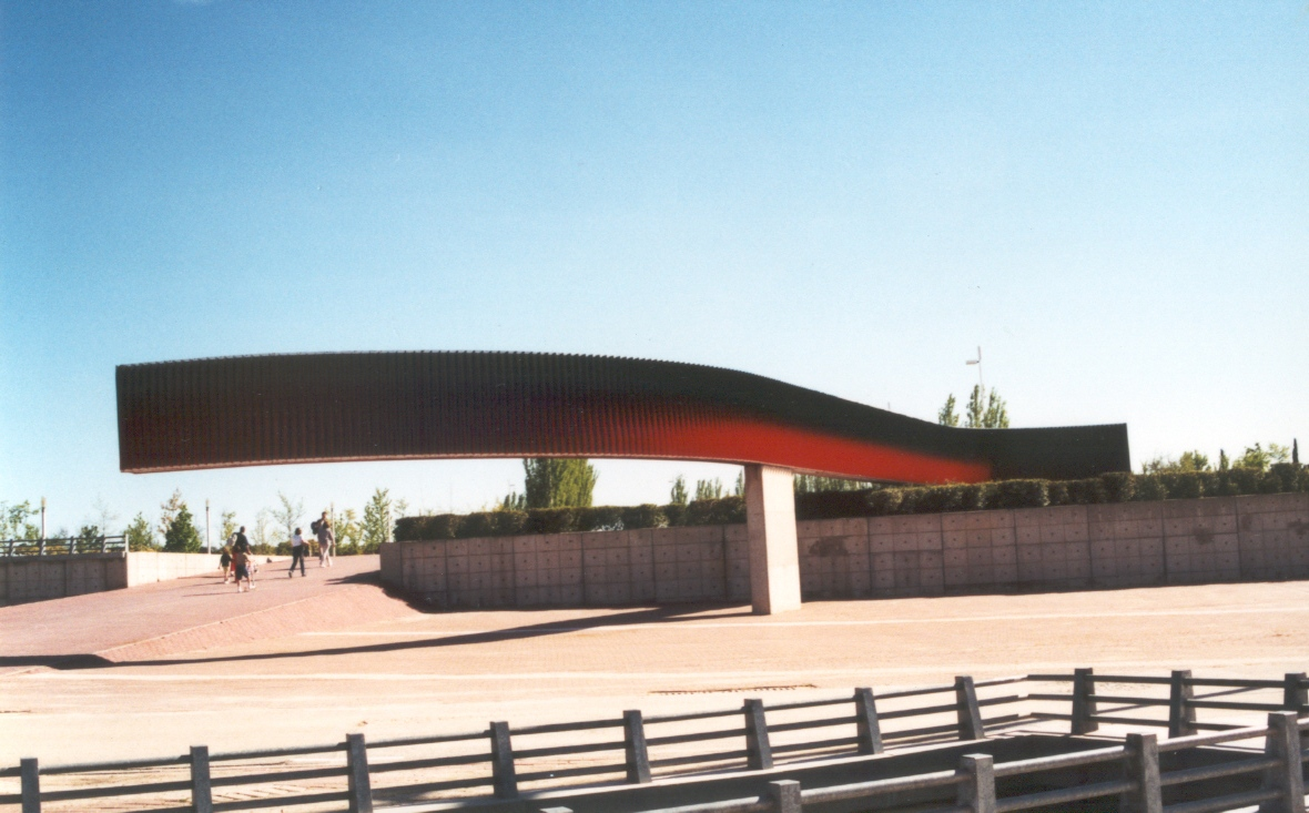 1991 "Fisicromía para Madrid" de doble faz. Obra del artista venezolano Carlos Cruz-Diez. Recinto Ferial, Parque Juan Carlos 1º. Madrid. Ings.: Miguel Angel Moreno y Emilio Baños. 40 mts X 2 mts. Autor foto: Fev. Año 2002.